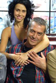 ליאת אזר בסדרה המקום